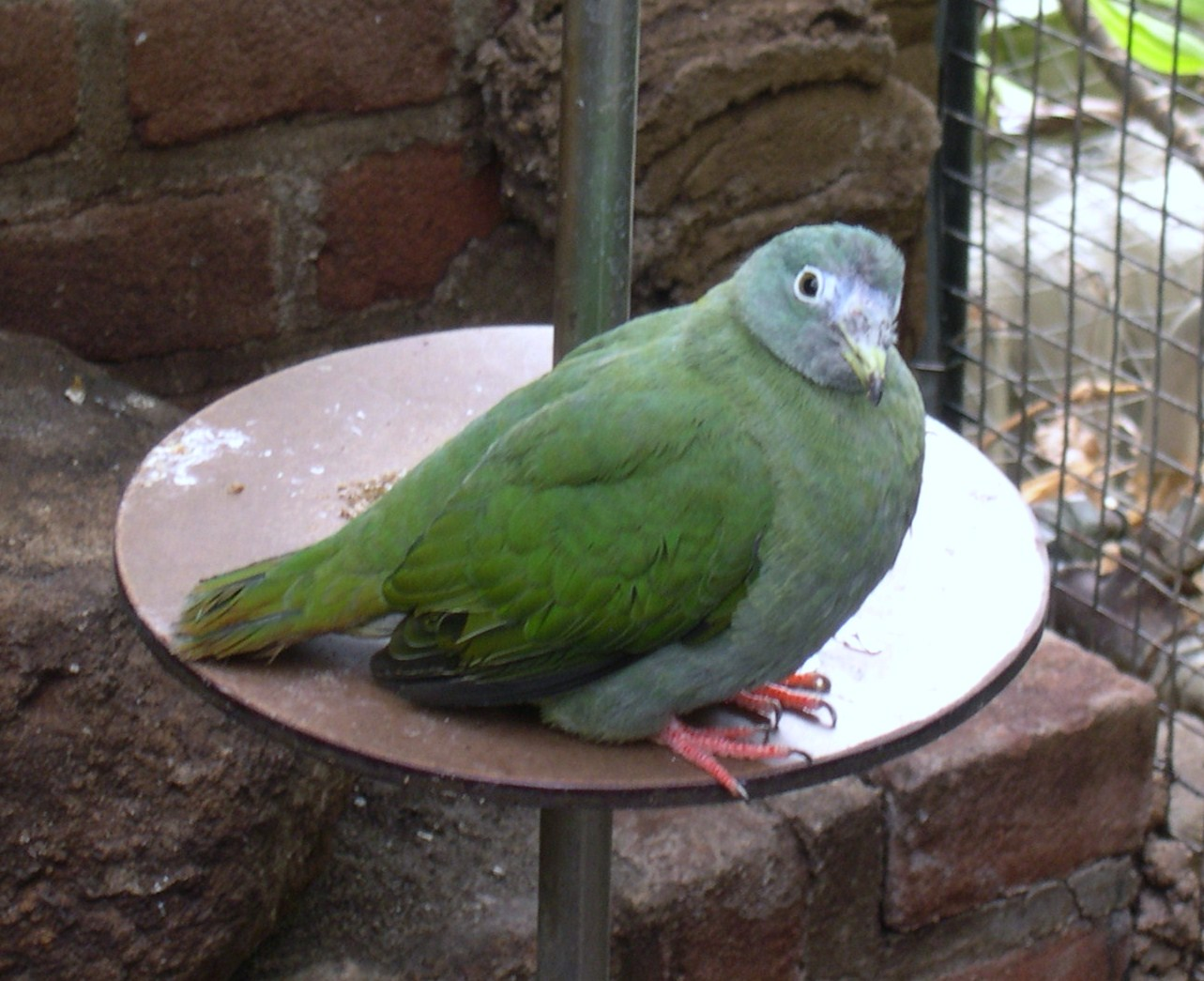 A female black-naped Fruit-dove (Ptilinopus melanospilus)